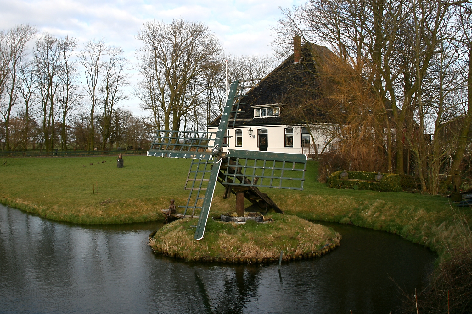 Zuidschermer: Paaltjasker